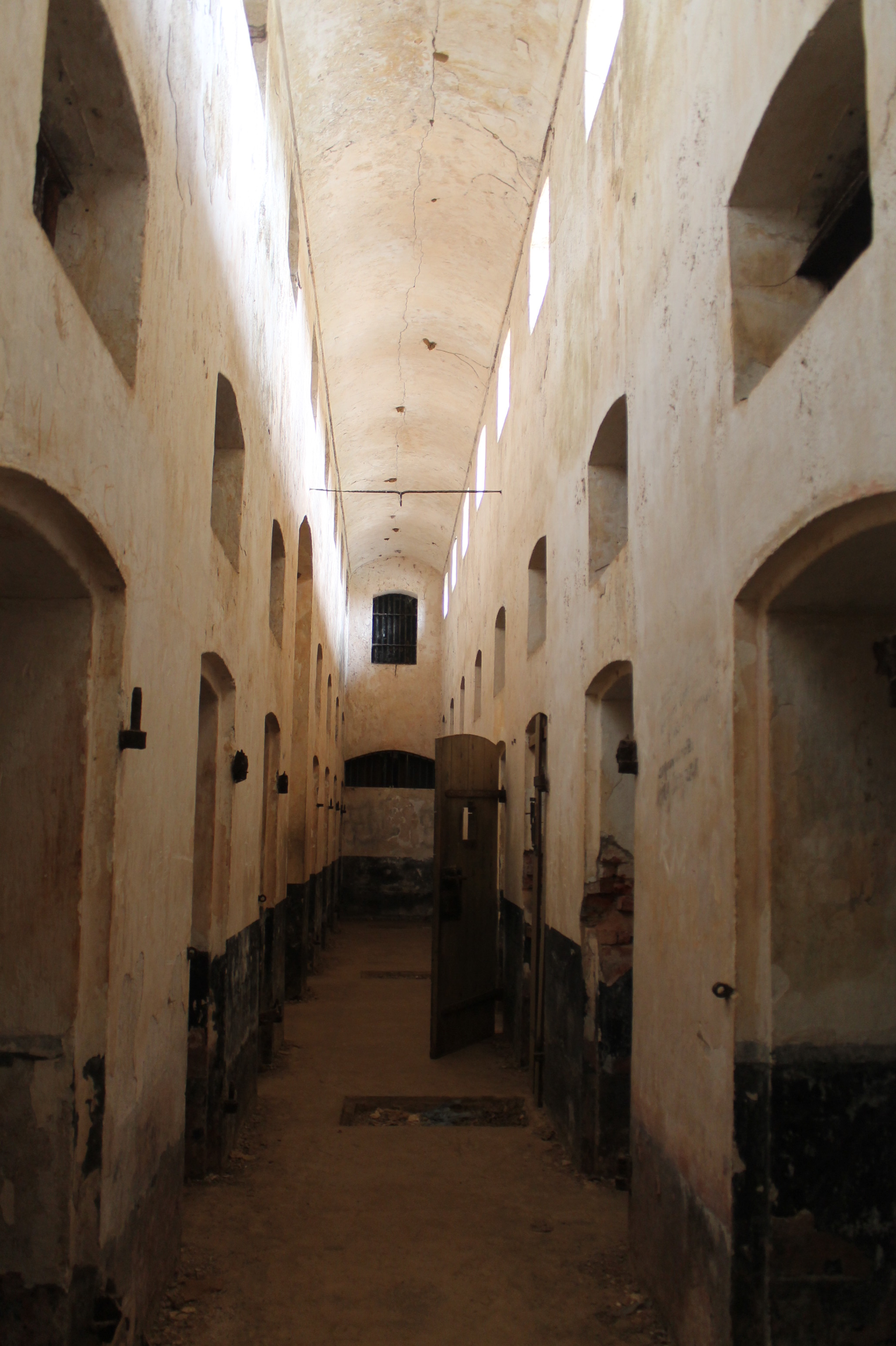 Bagne situé sur l'île royale, une des trois îles du salut. Situé en Guyane Française